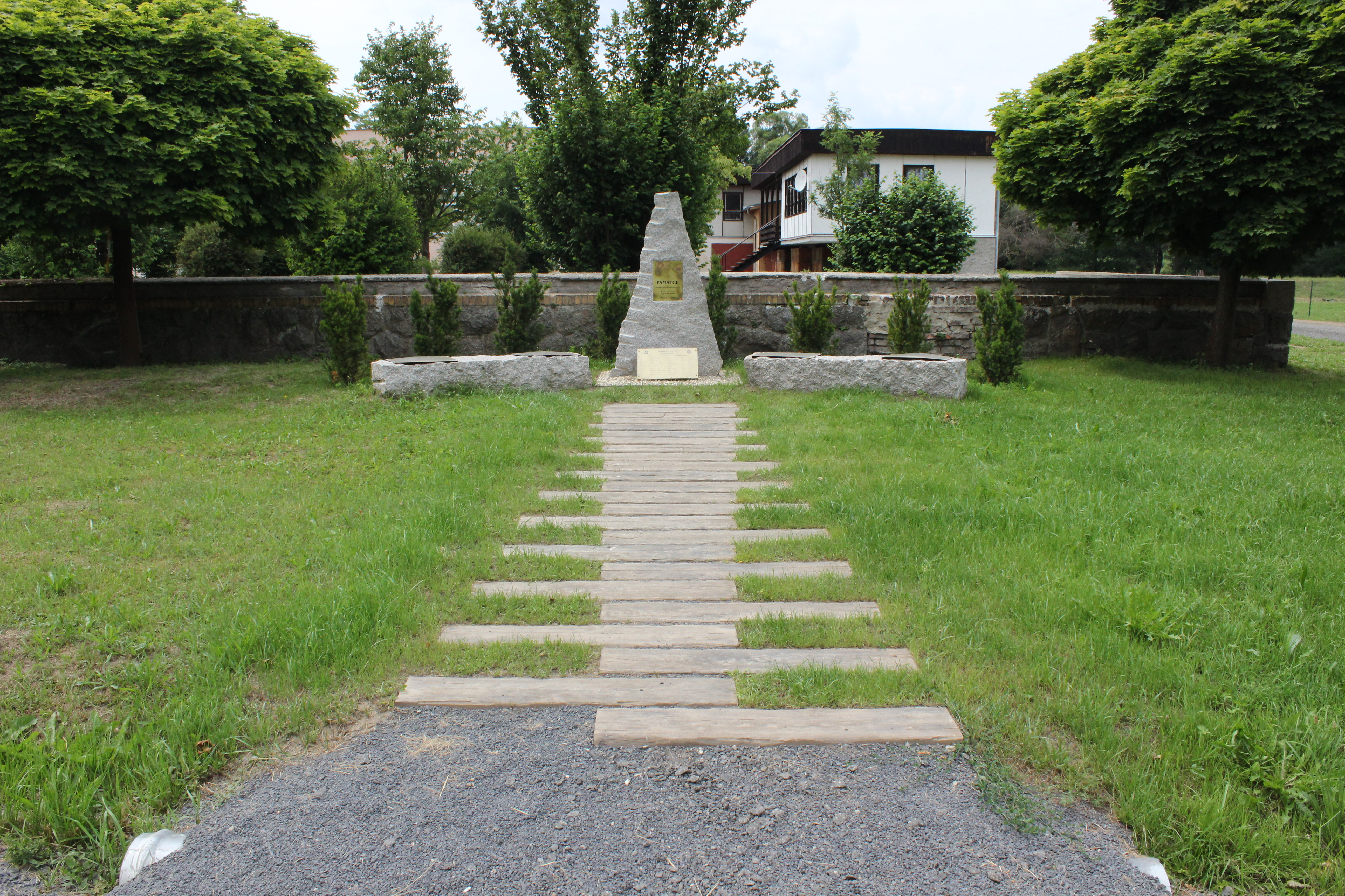 Celkový pohled na památník posádce sestřeleného letadla ve Vísce, součásti Višňové v okrese Liberec.